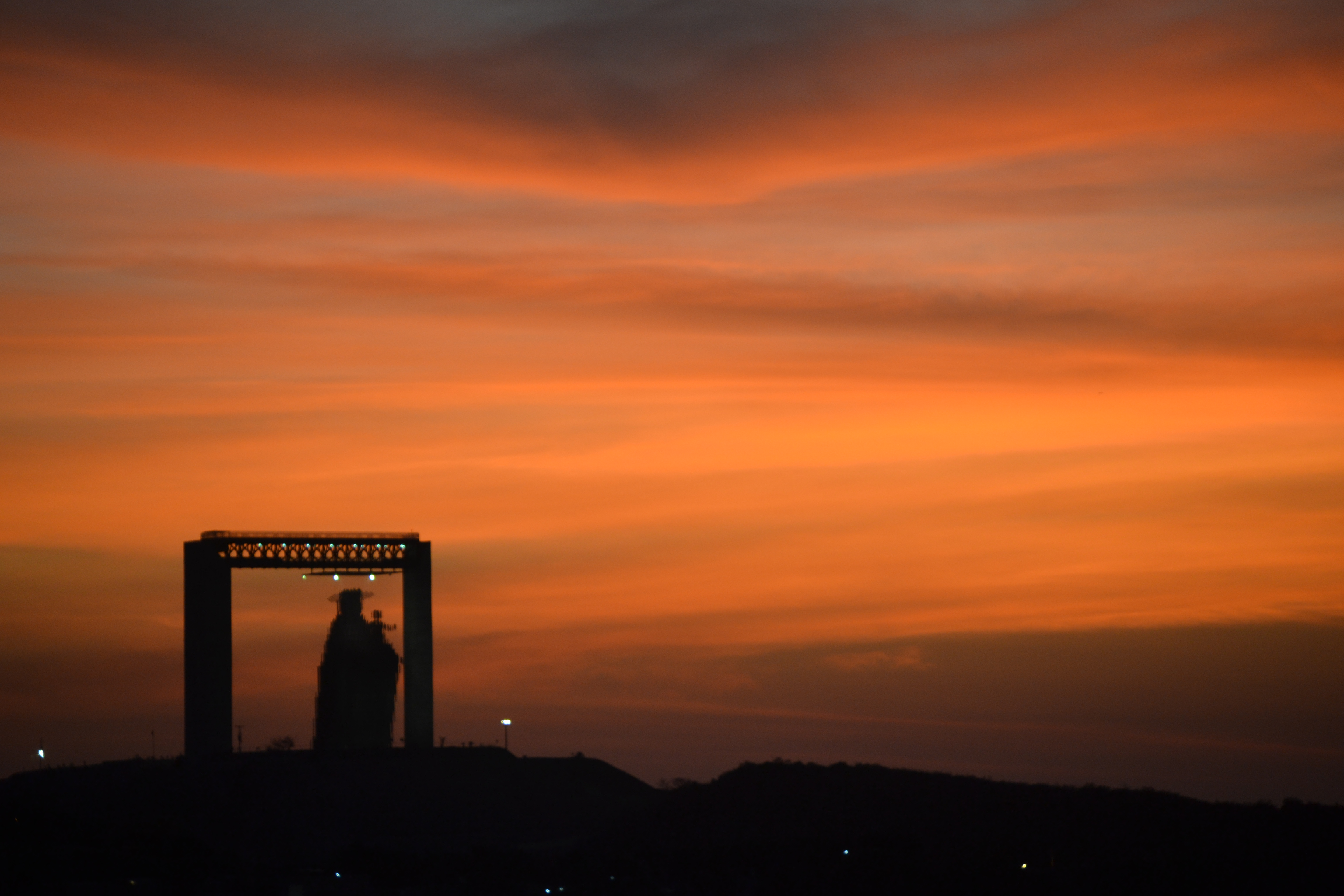 Monumento Manto de Maria Divina Pastora, en sector Veragacha, Barquisimeto, estado Lara VZLA